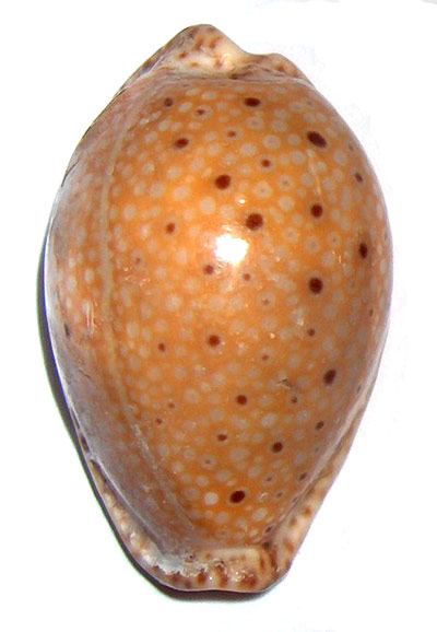 Erosaria ocellata (synonym : Cypraea ocellata), Tuticorin (Inde)